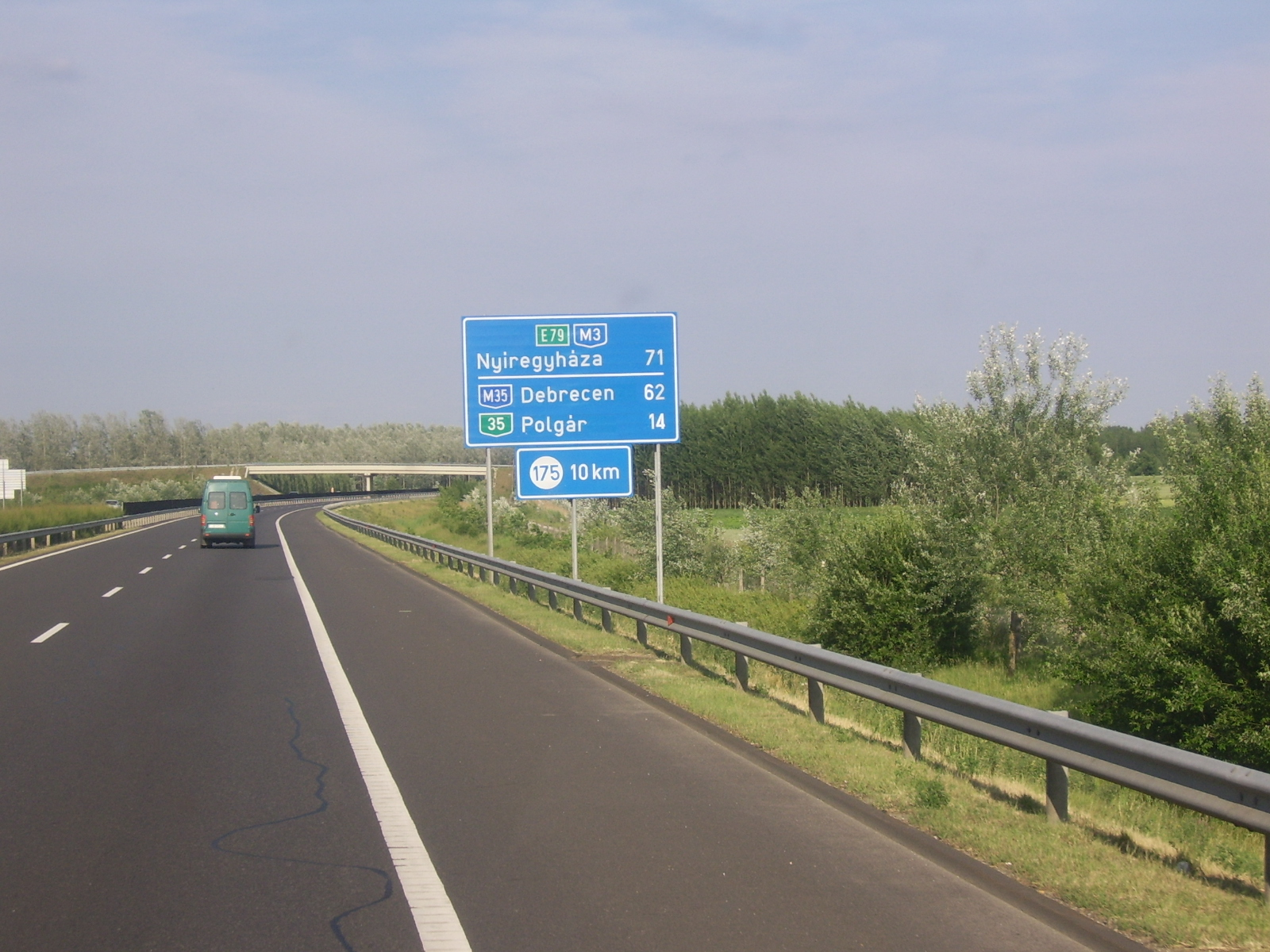 A 165-ös kilométernél található tájékoztató tábla Hejőkürtnél